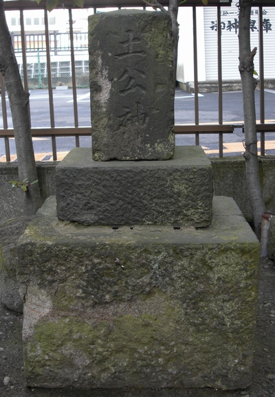 Dokujin (土公神, soil kami from onmyōdō) in Koto, Tokyo (東京都江東区)